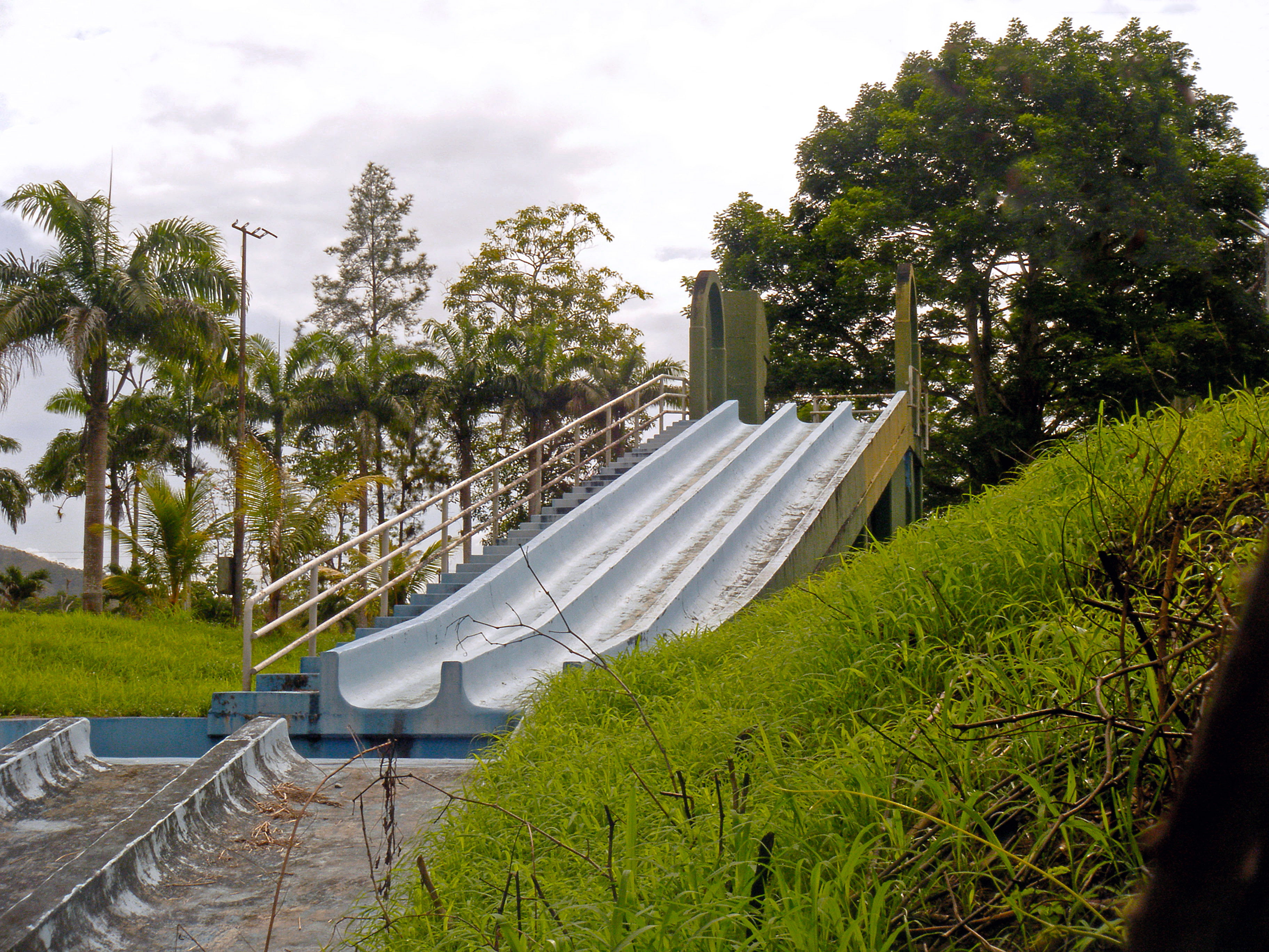 Balneario La Bomba de Caripito, Estado Monagas, Venezuela.